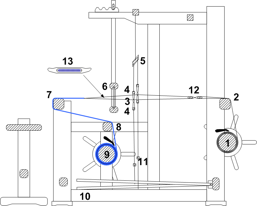 Skjematisk vevstol